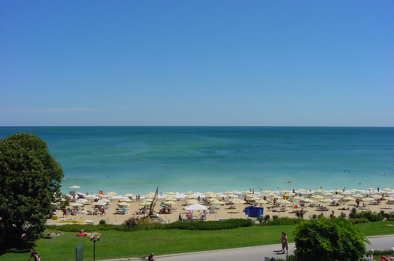 Beschreibung: Goldstrand Bulgarien selbst fotografiert: Clément Dominik Datum: Sommer 2002